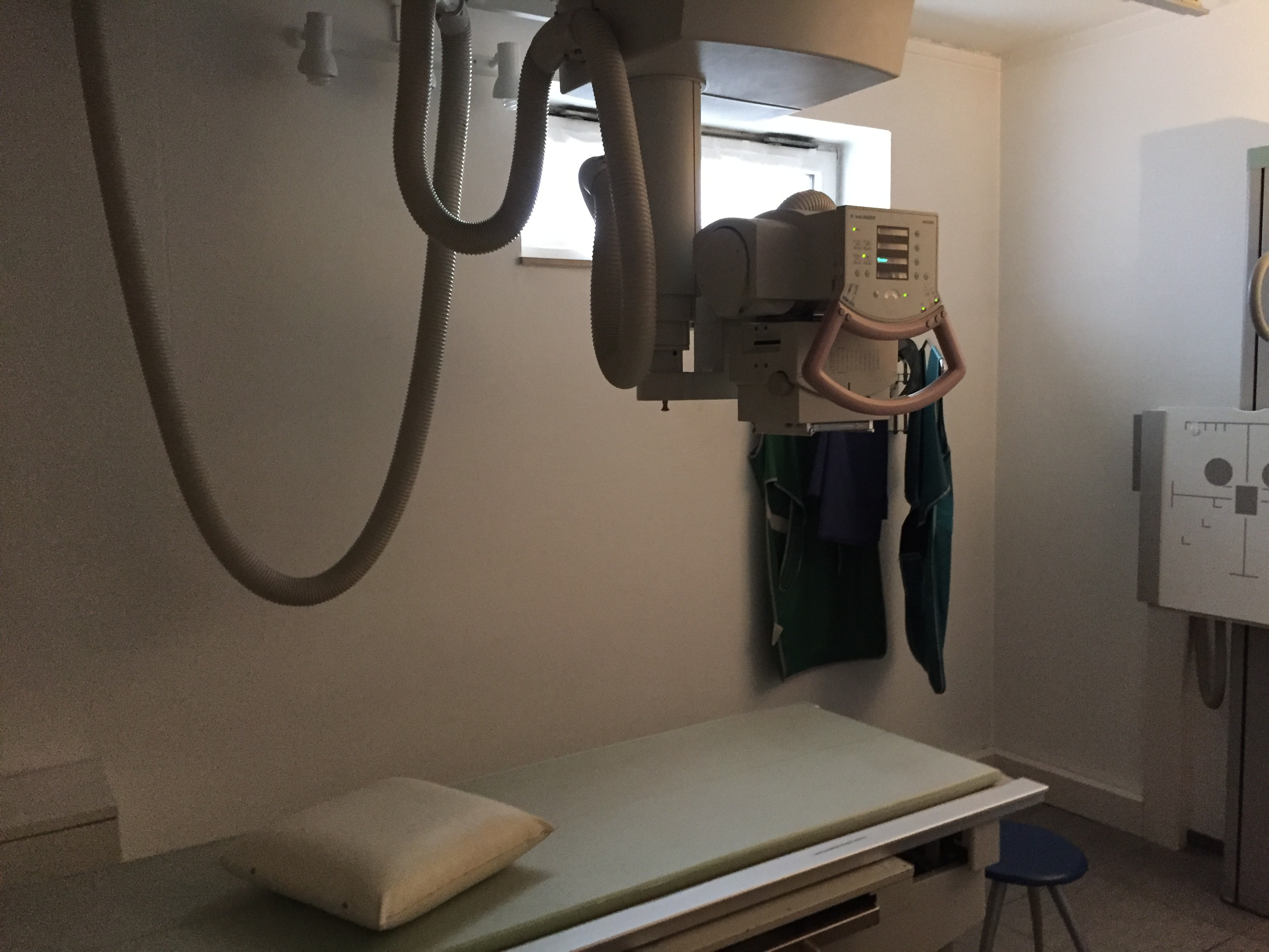 Röntgengerät